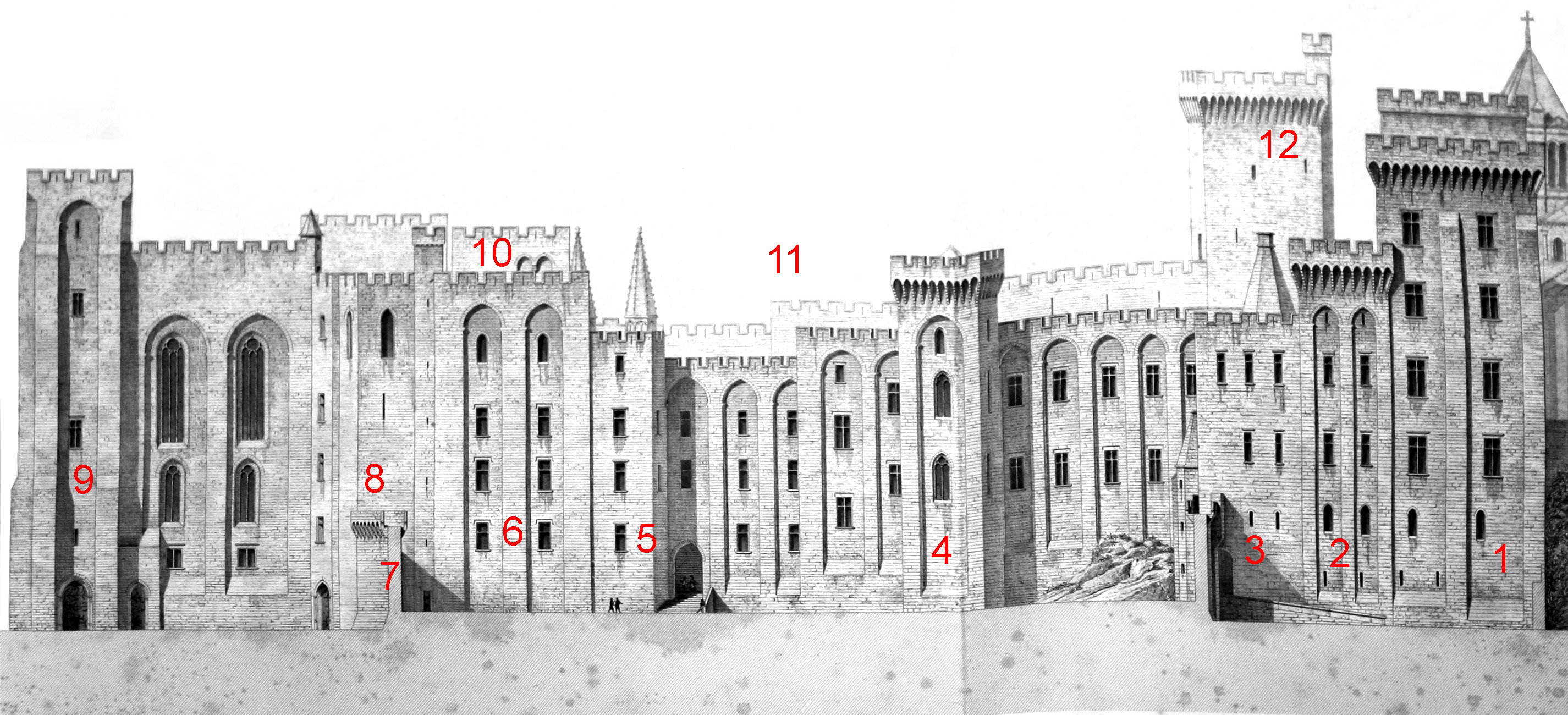 les douze tours du Palais sur plan des façades par Viollet-le-duc - Palais des Papes, Avignon, Vaucluse, France